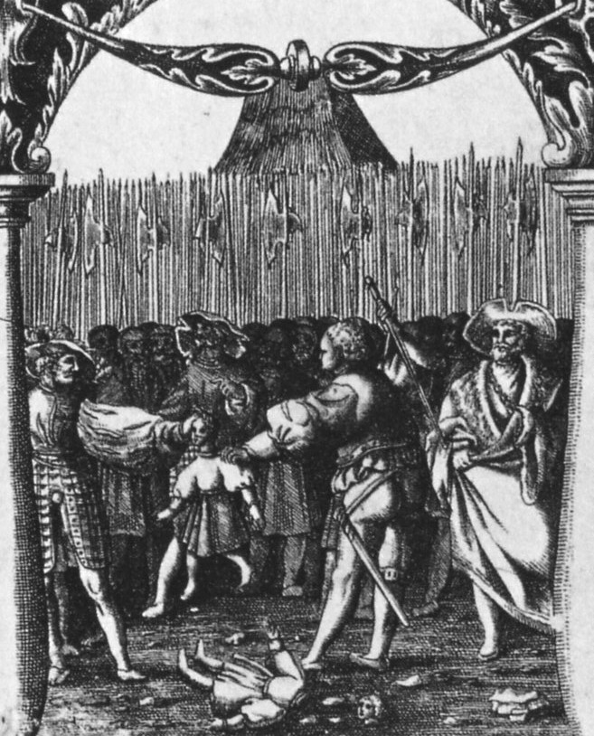 Blodbadstavlans serierutor, scen 7